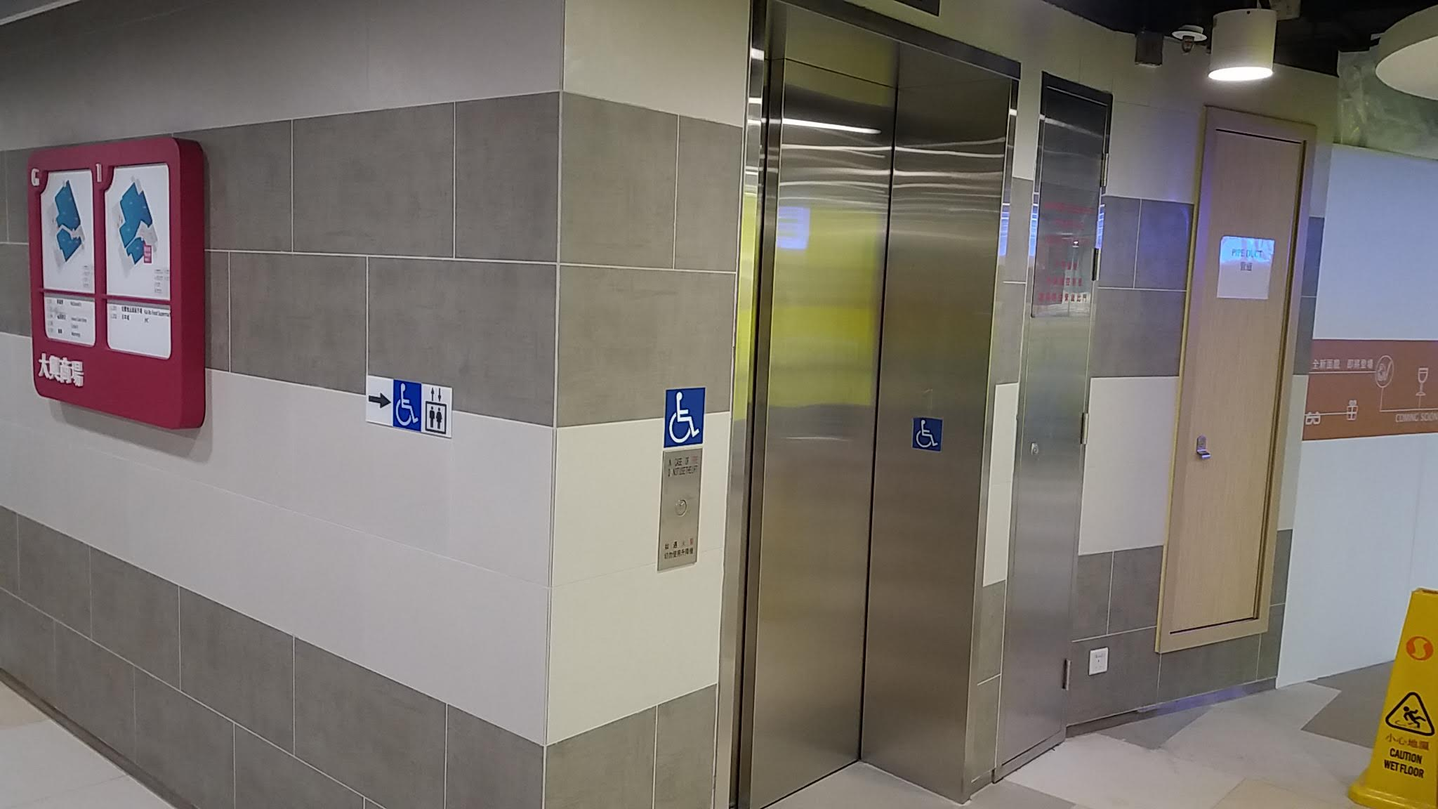 新增設的升降機